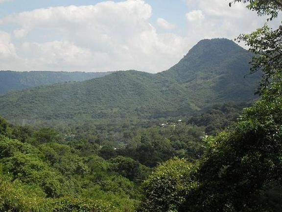 Xotiamit